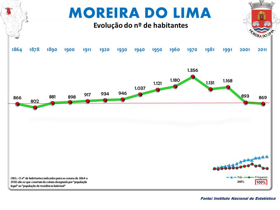 Cenos 1864/2011